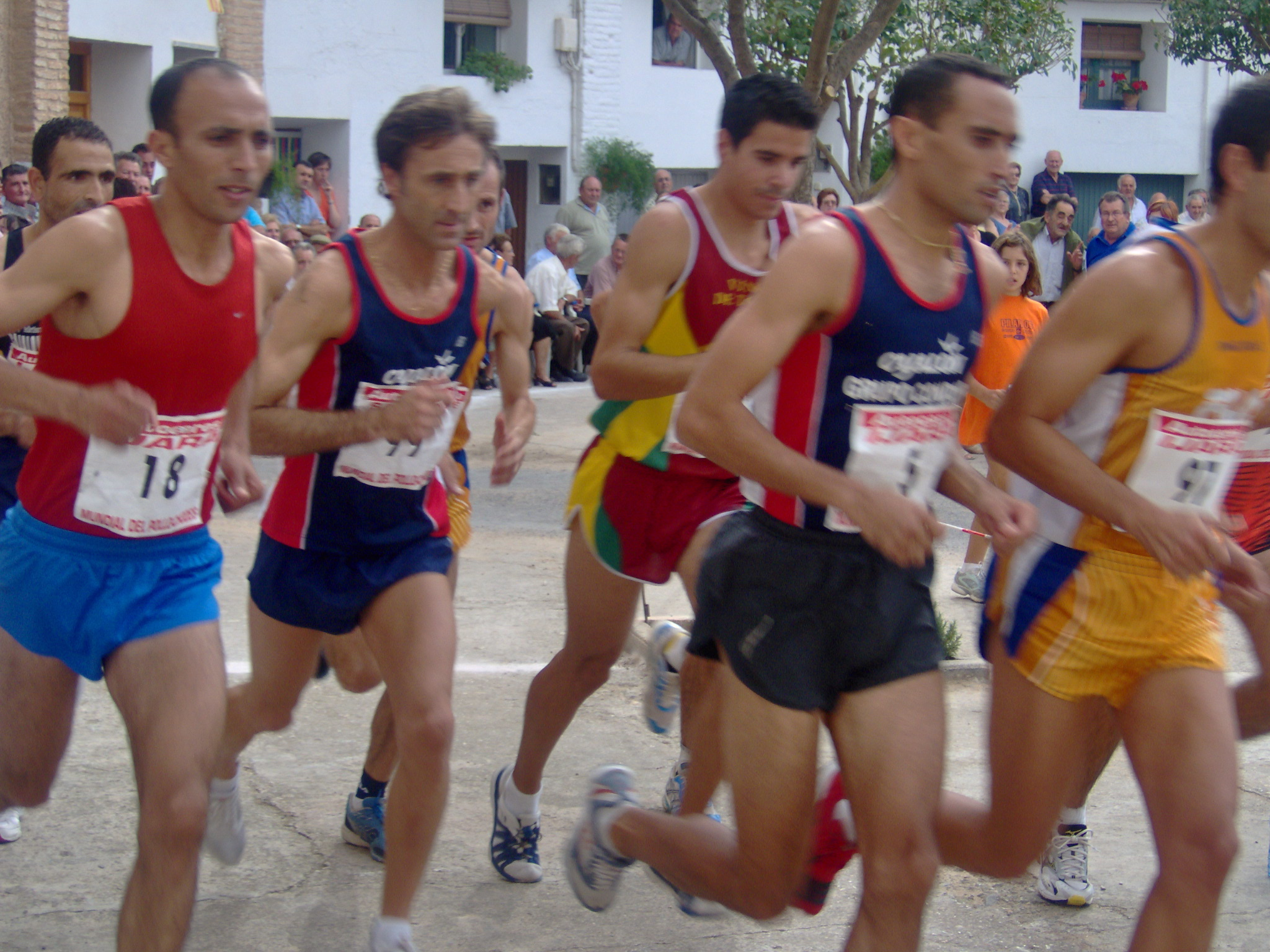 corredores de la carrera de chodes del 1 de octubre de 2006